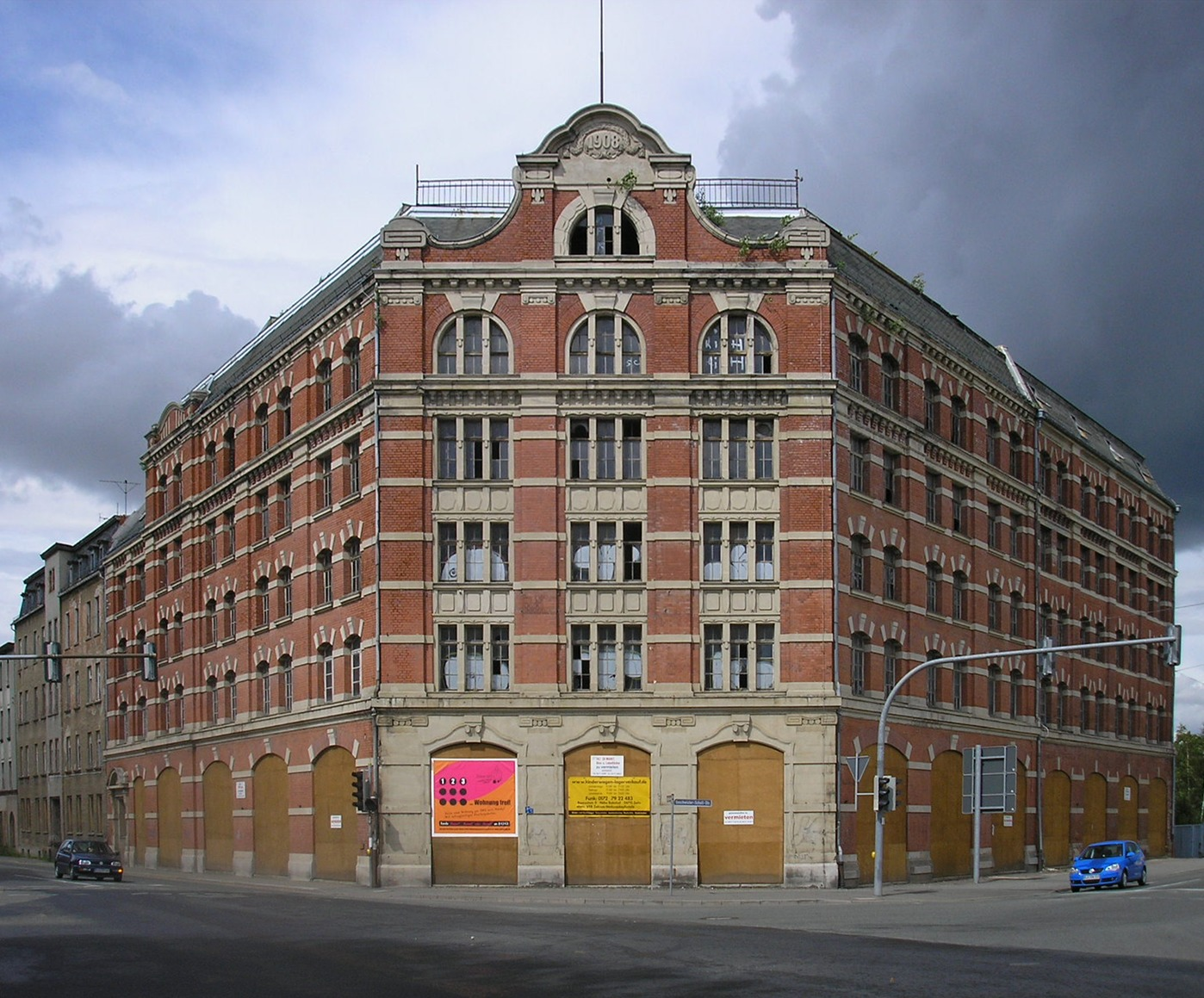 Ein leerstehendes Fabrikgebäude in Zeitz.